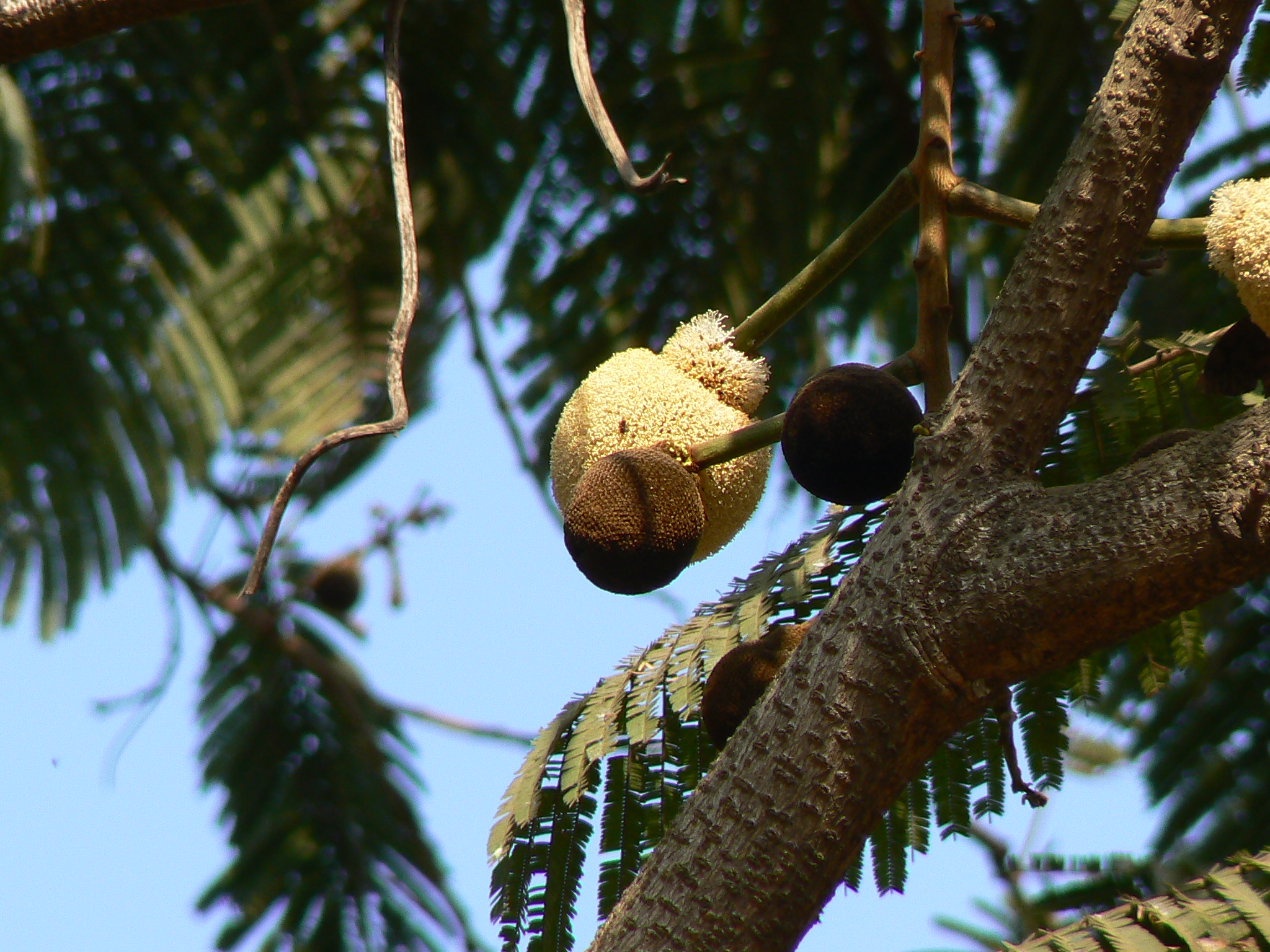 Parkia biglandulosa